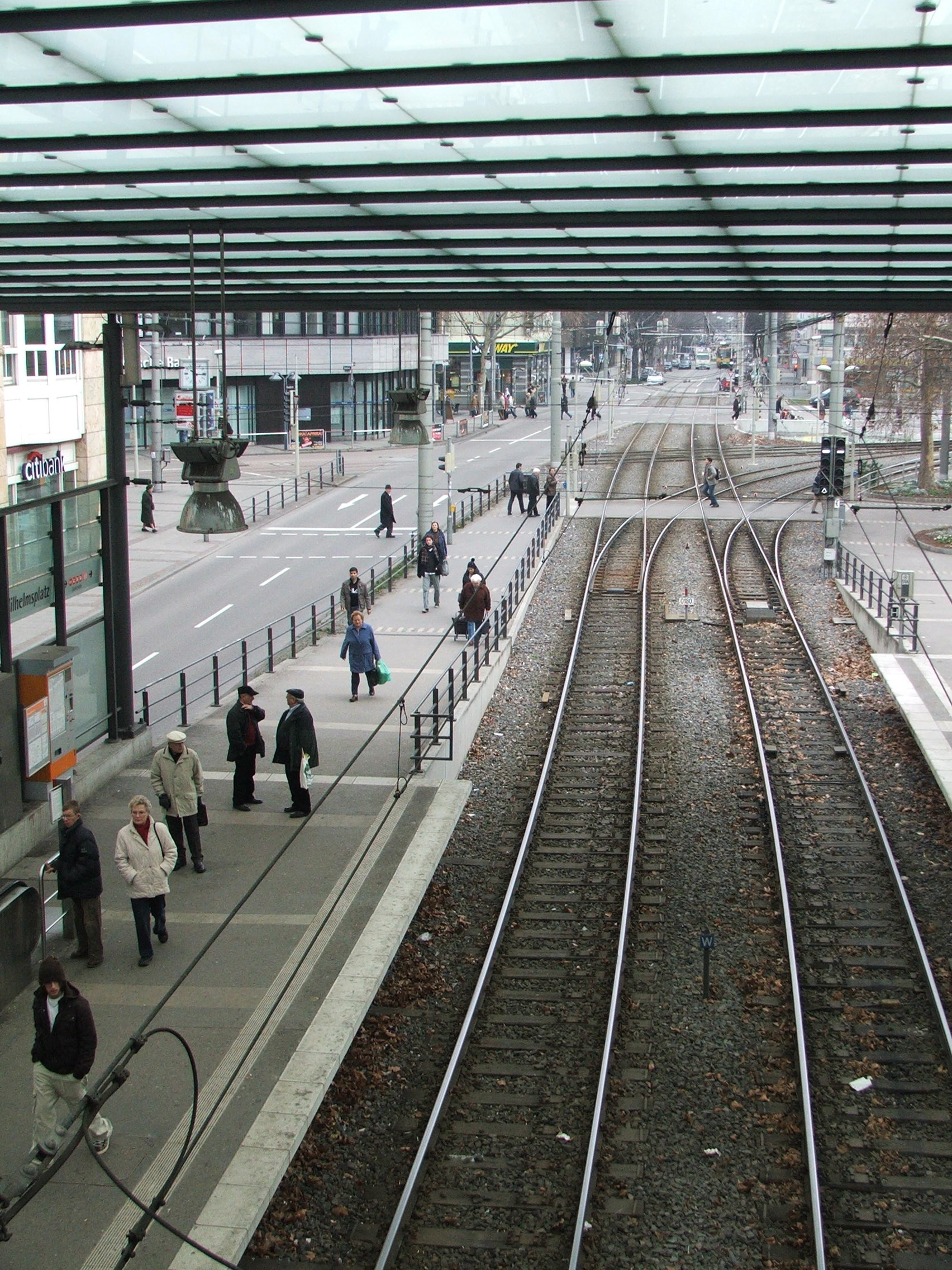 Station Wilhelmsplatz, Stadtbahn Stuttgart